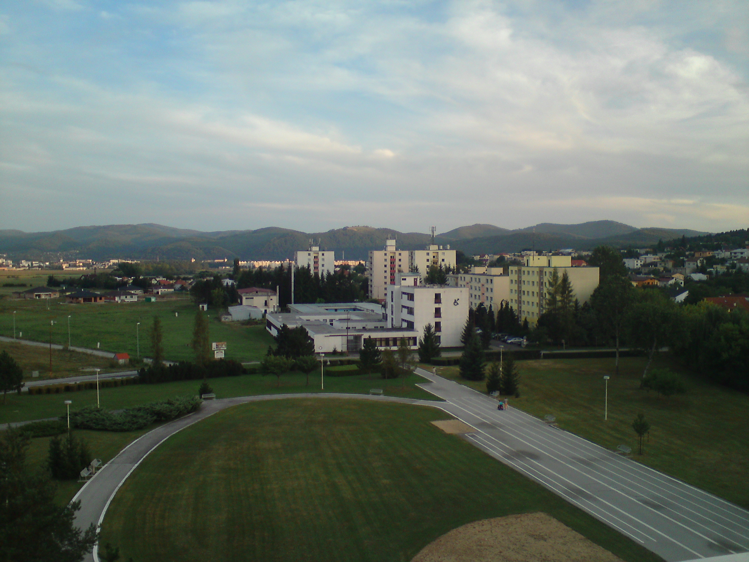 Cast obce z NRC